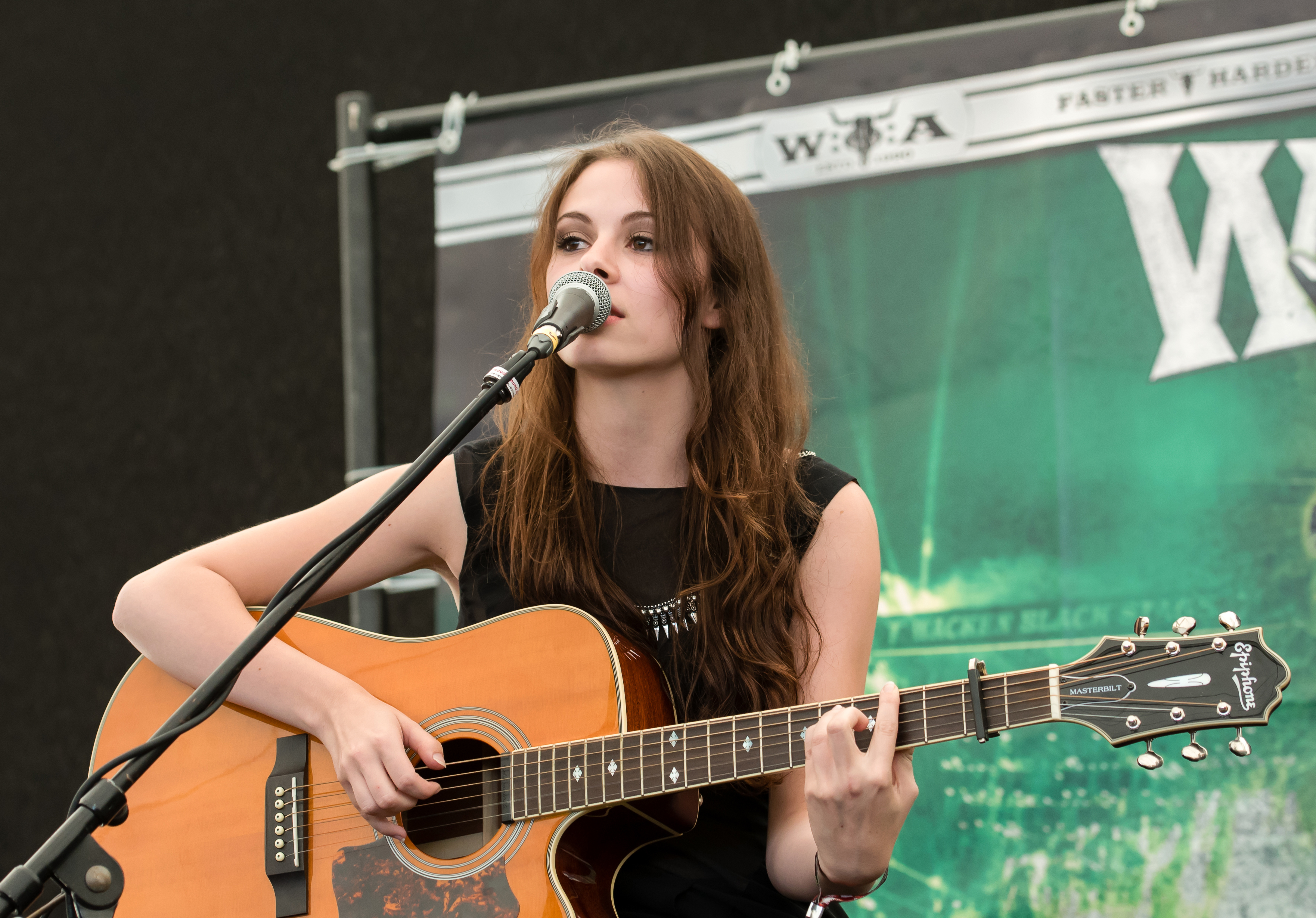 Jennifer Haben beim Wacken Open Air 2016